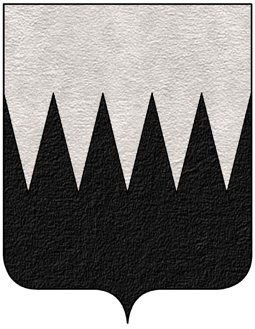 Stemma della famiglia Ruffo